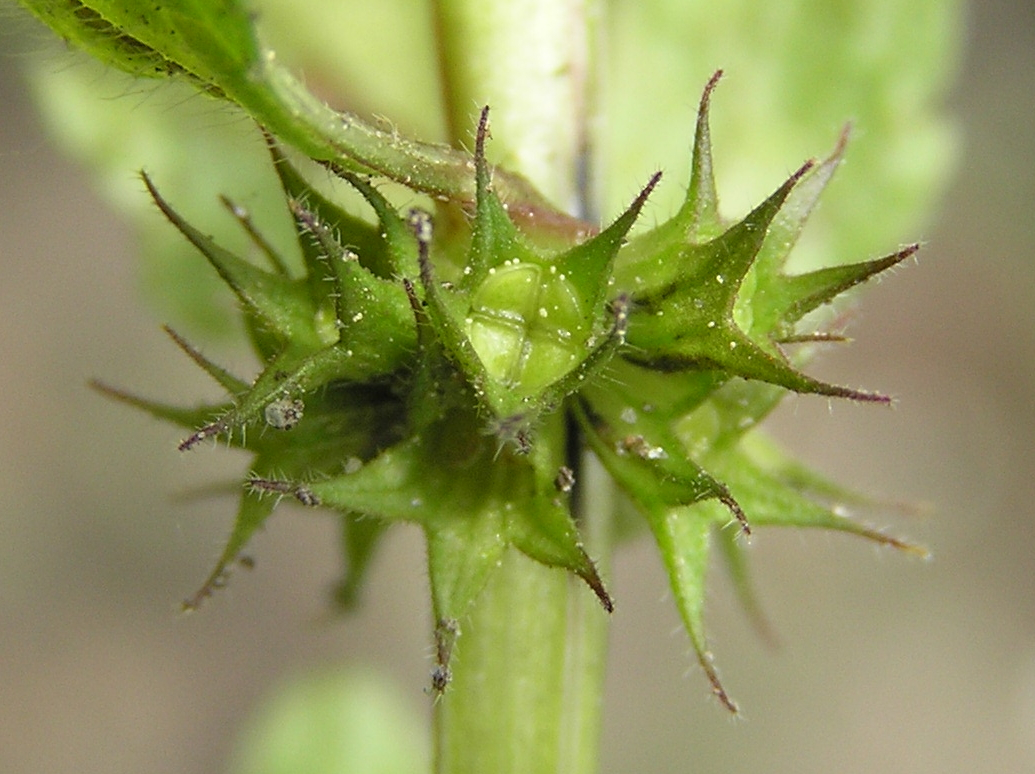 Lamium purpureum, Jasnota purpurowa, Białowieża, Polska